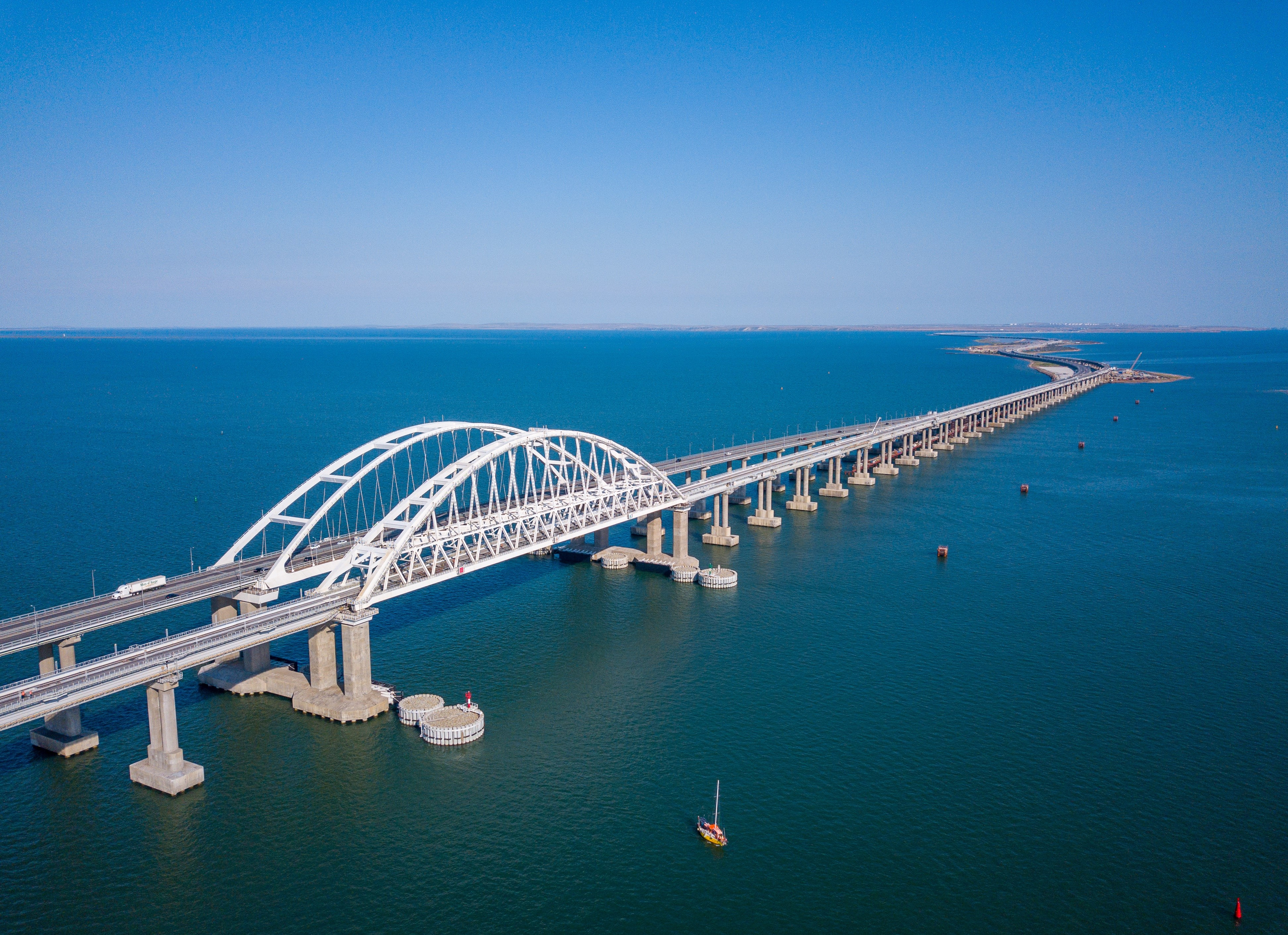 Крымский мост. 13 сентября 2019 года.